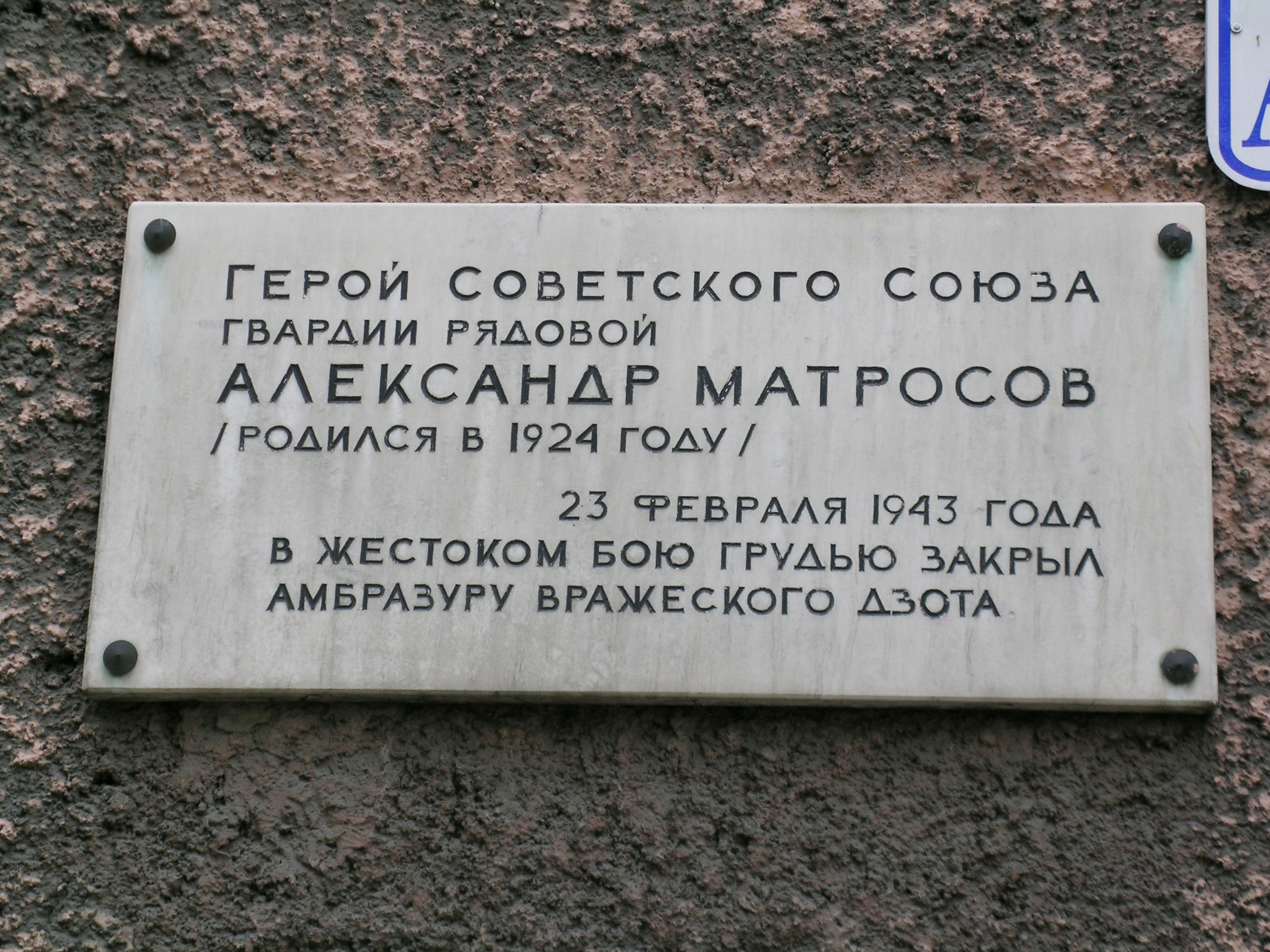 Мемориальная доска на улице А. Матросова в Санкт-Петербурге ([1]) гласит: «Герой Советского Союза гвардии рядовой Александр Матросов /родился в 1924 году/ 23 февраля 1943 года в жестоком бою грудью закрыл амбразуру вражеского ДЗОТа»